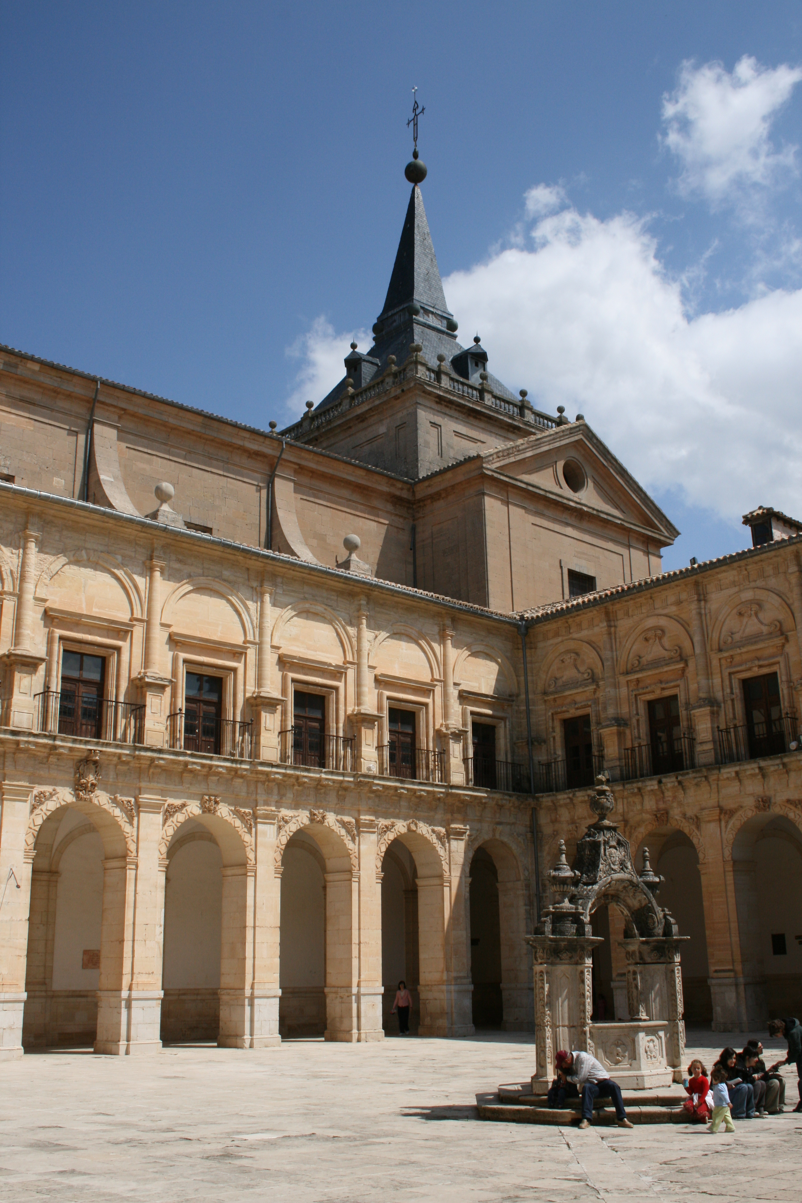 Monasterio de Uclés, Cuenca, España - Vista de la torre de la cabecera de la iglesia desde el patio